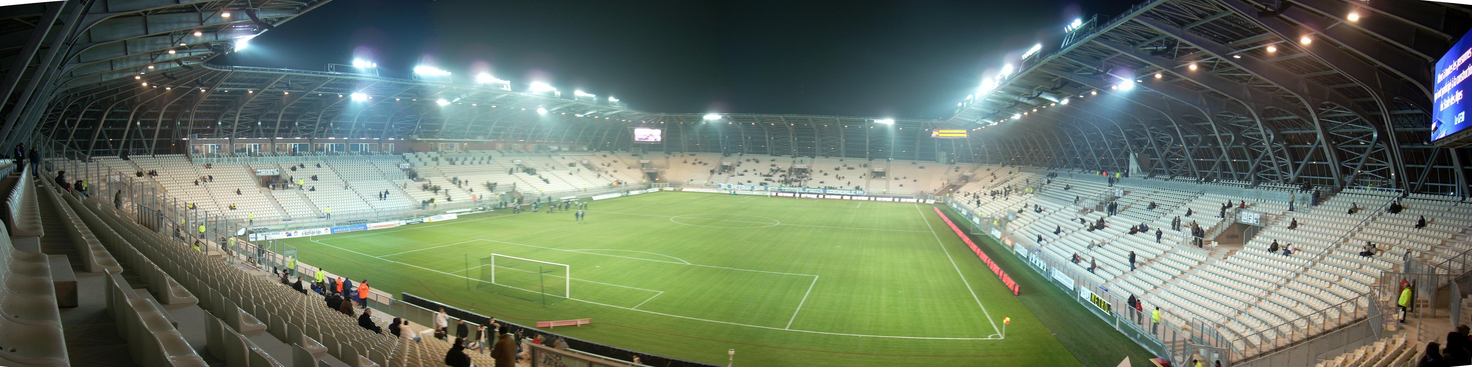 Inauguration Stade des Alpes